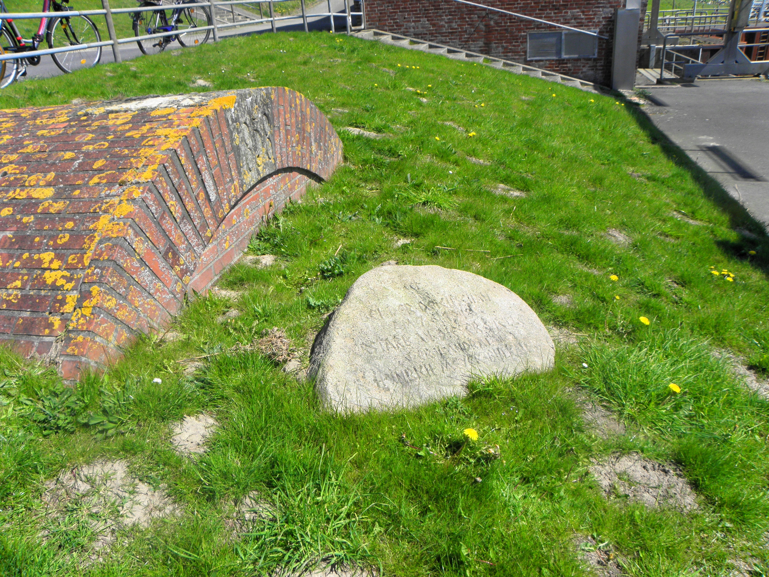 Denkmal Altenbrucher Schleuse; Bei der Deichschau am 7. Juni 1948 verstarb an dieser Stelle der Landrat Heinrich Meyer, Bülkau